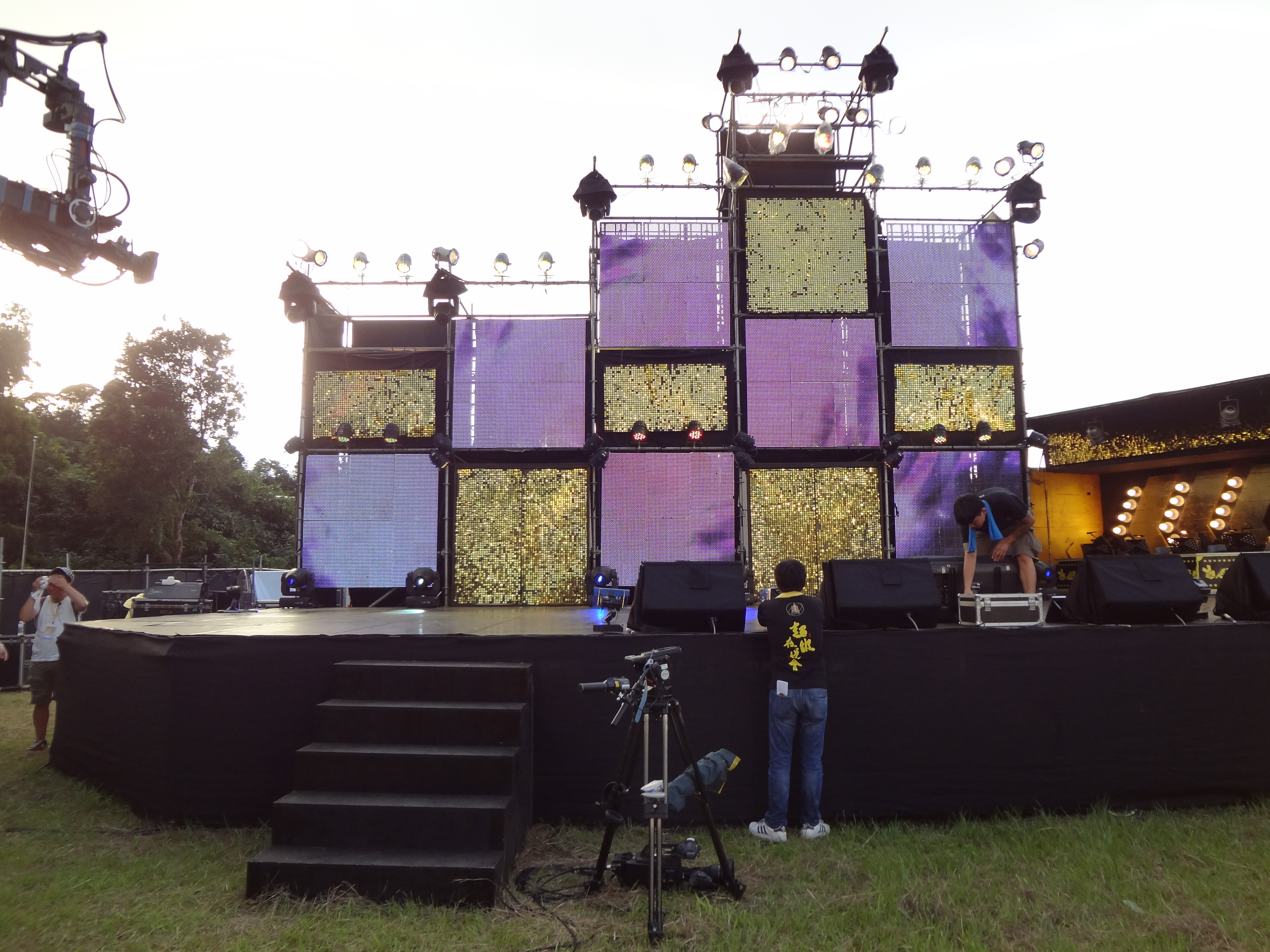 三立台灣台綜藝節目《超級夜總會》於基隆市七堵區堵南國民小學操場錄影，開始錄影前的舞台。